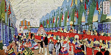 英一番館の資料